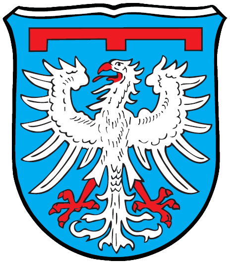 Hardenburg liegt am Fuß der gleichnamigen Leininger Burg, die über 200 Jahre Sitz einer nach ihr benannten Leininger Nebenlinie war, die seit 1379 dem Leininger Adler einen dreilätzigen roten Turnierkragen hinzufügte. Die Gemeinde hat dieses nicht mehr geführte Adelswappen übernommen.